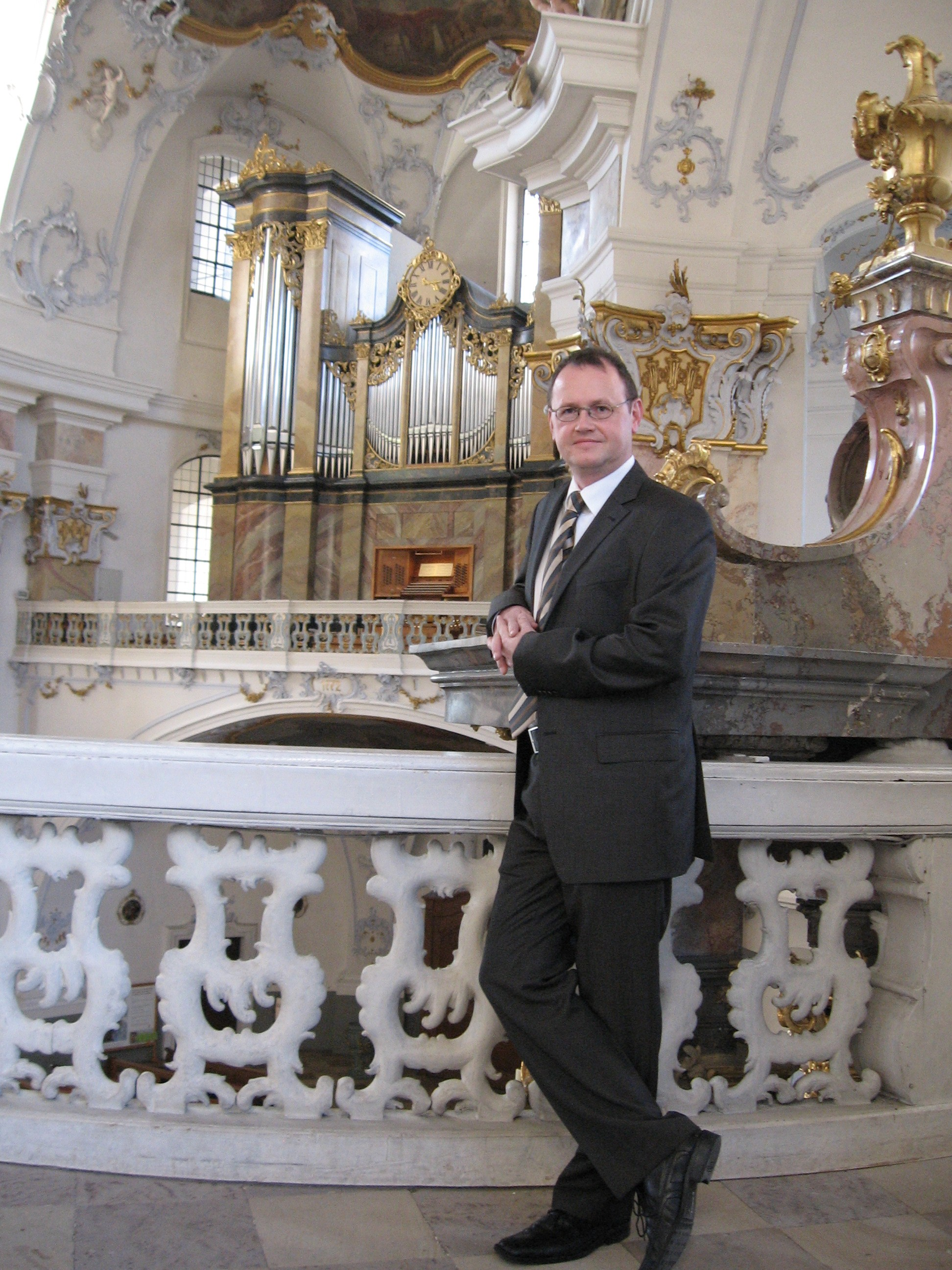 Georg Hagel Vierzehnheiligen